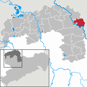 Arzberg in Saxony - Landkreis Nordsachsen